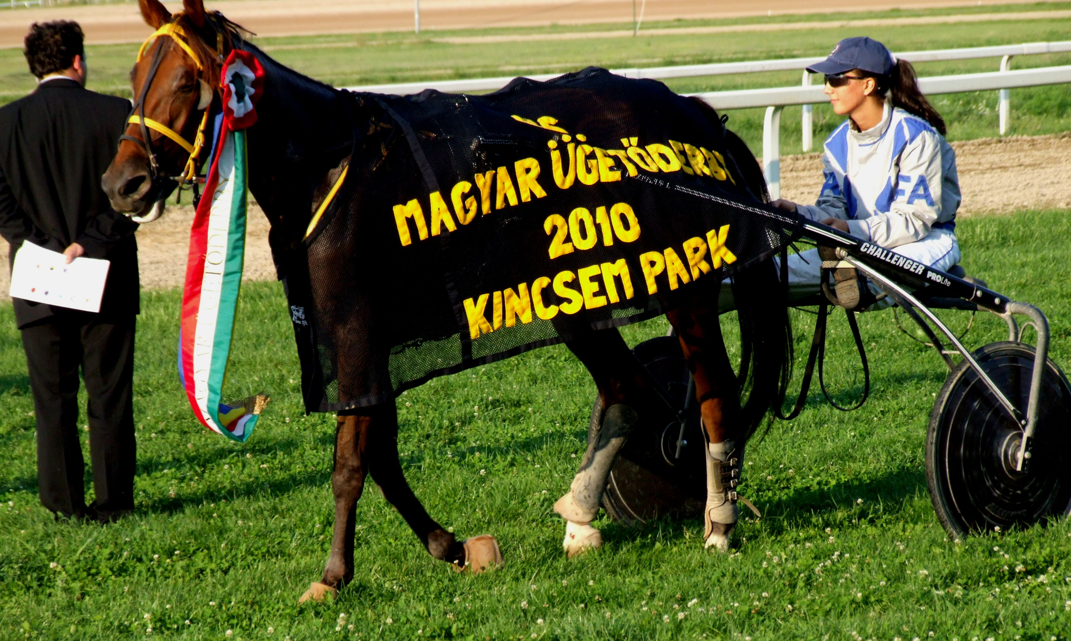 A derby győztes Naná